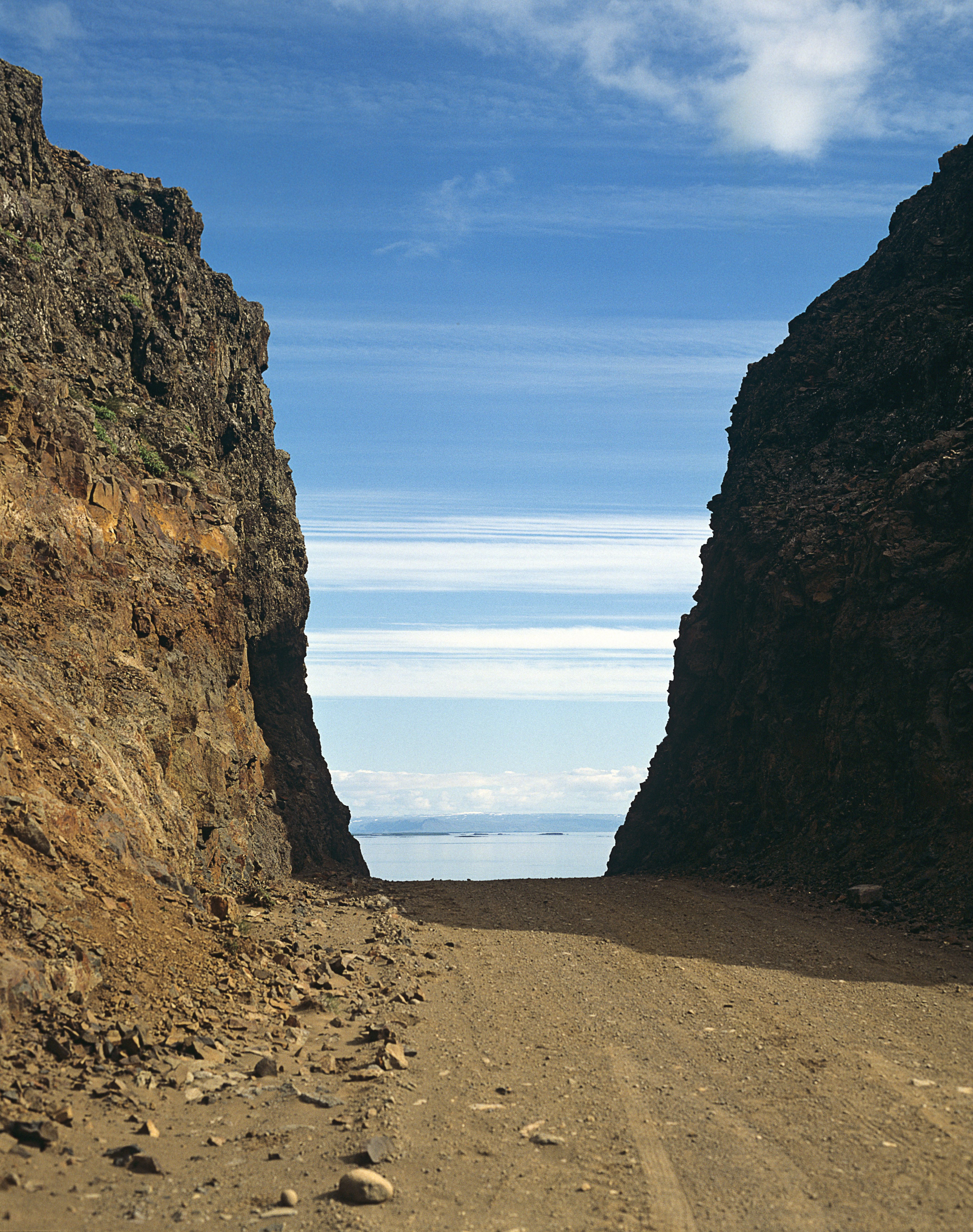 Klofningur in den Westfjorden